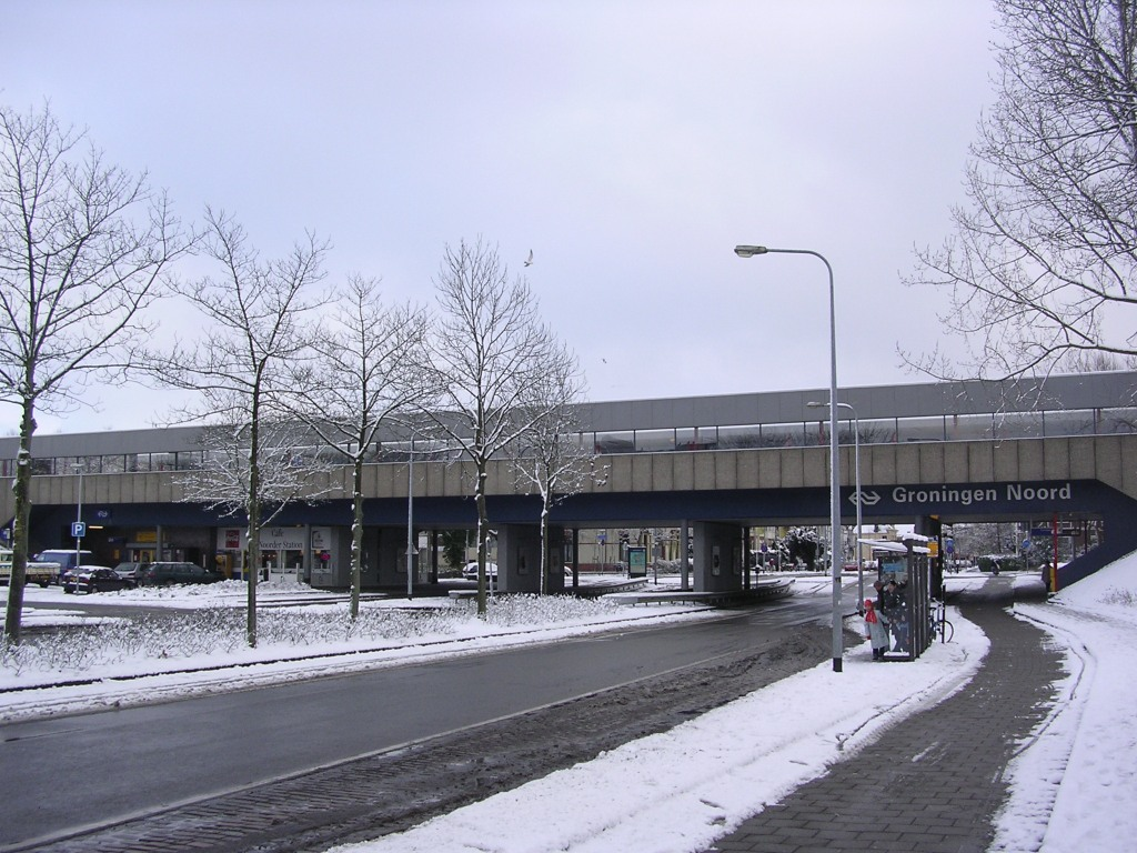 Station Groningen Noord na een sneeuwbui, gezien vanaf de Kastanjelaan